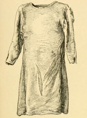 Robe médiévale exhumée de la nécropole d'Herjolfsnes.